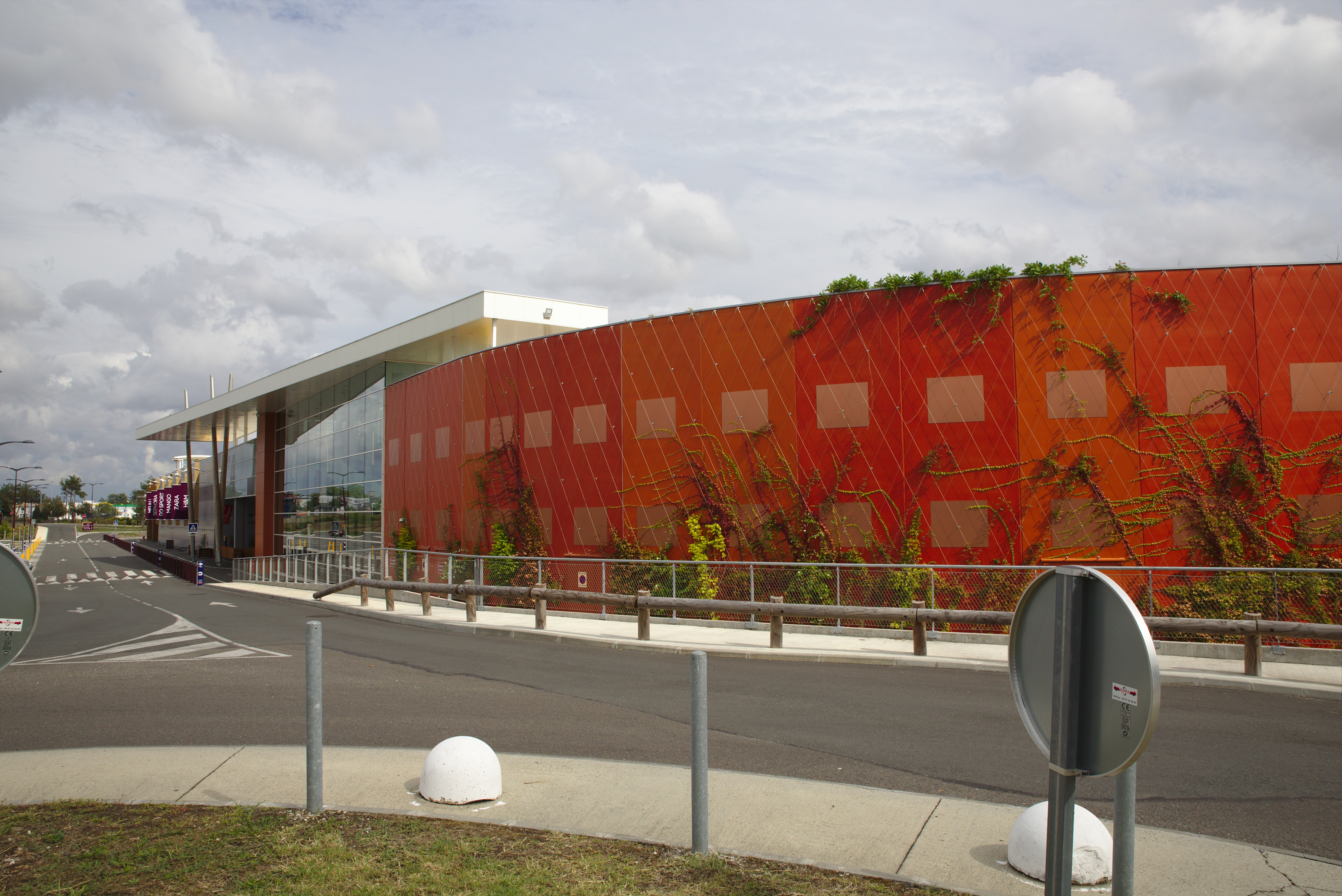 Agrandissement du centre commercial Mérignac Soleil